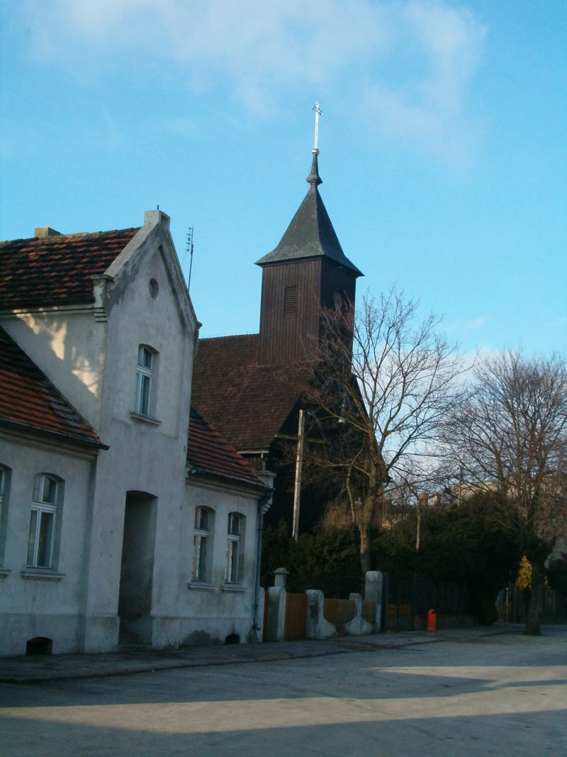 Widok obecny na Kościół św. Tekli i dawny budynek Szpitala Parafialnego. Dobrzyca, powiat pleszewski, woj. wielkopolskie